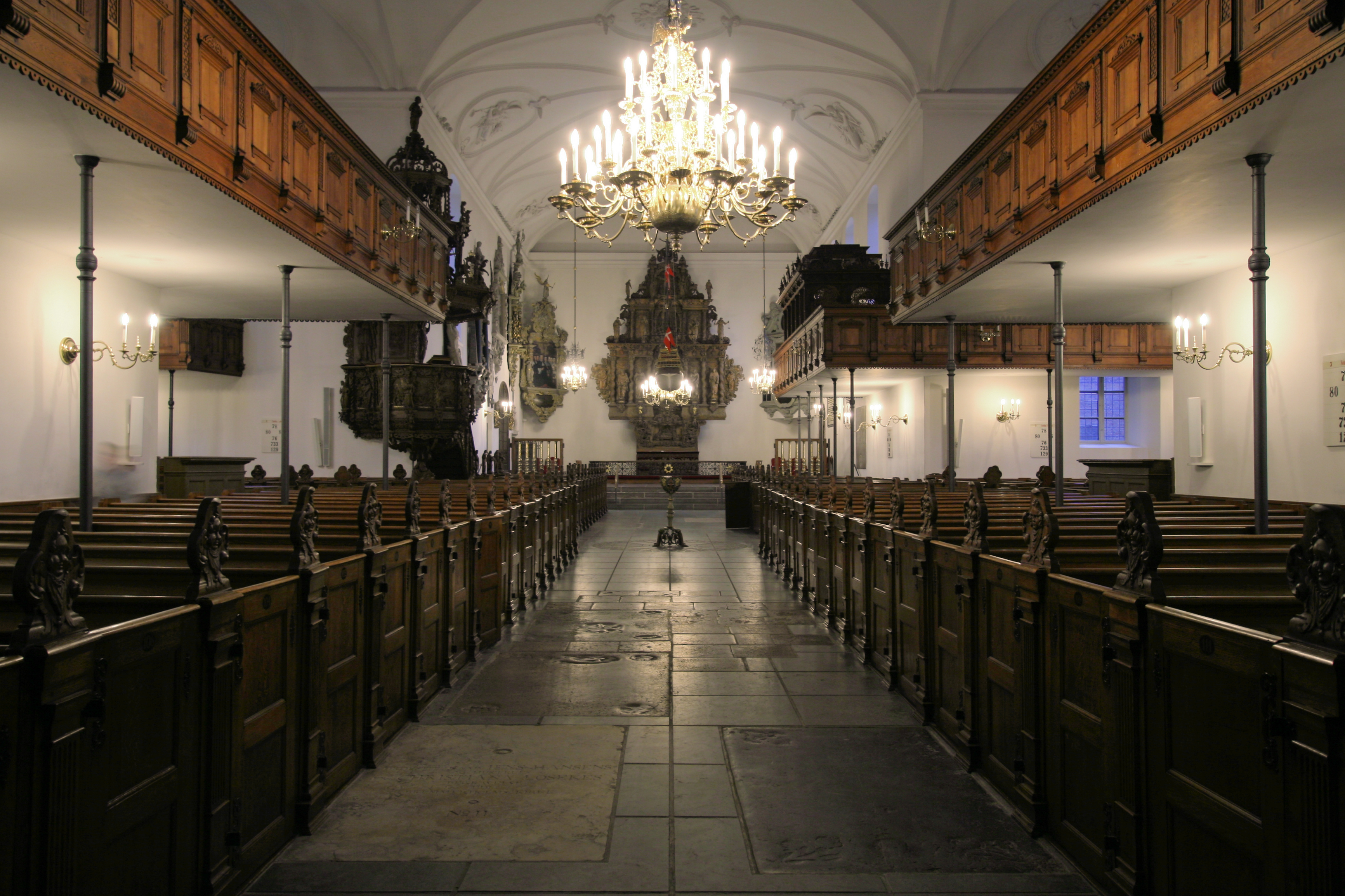 Holmens Kirke, Copenhagen, Denmark . Interiør fra Skippergangen.